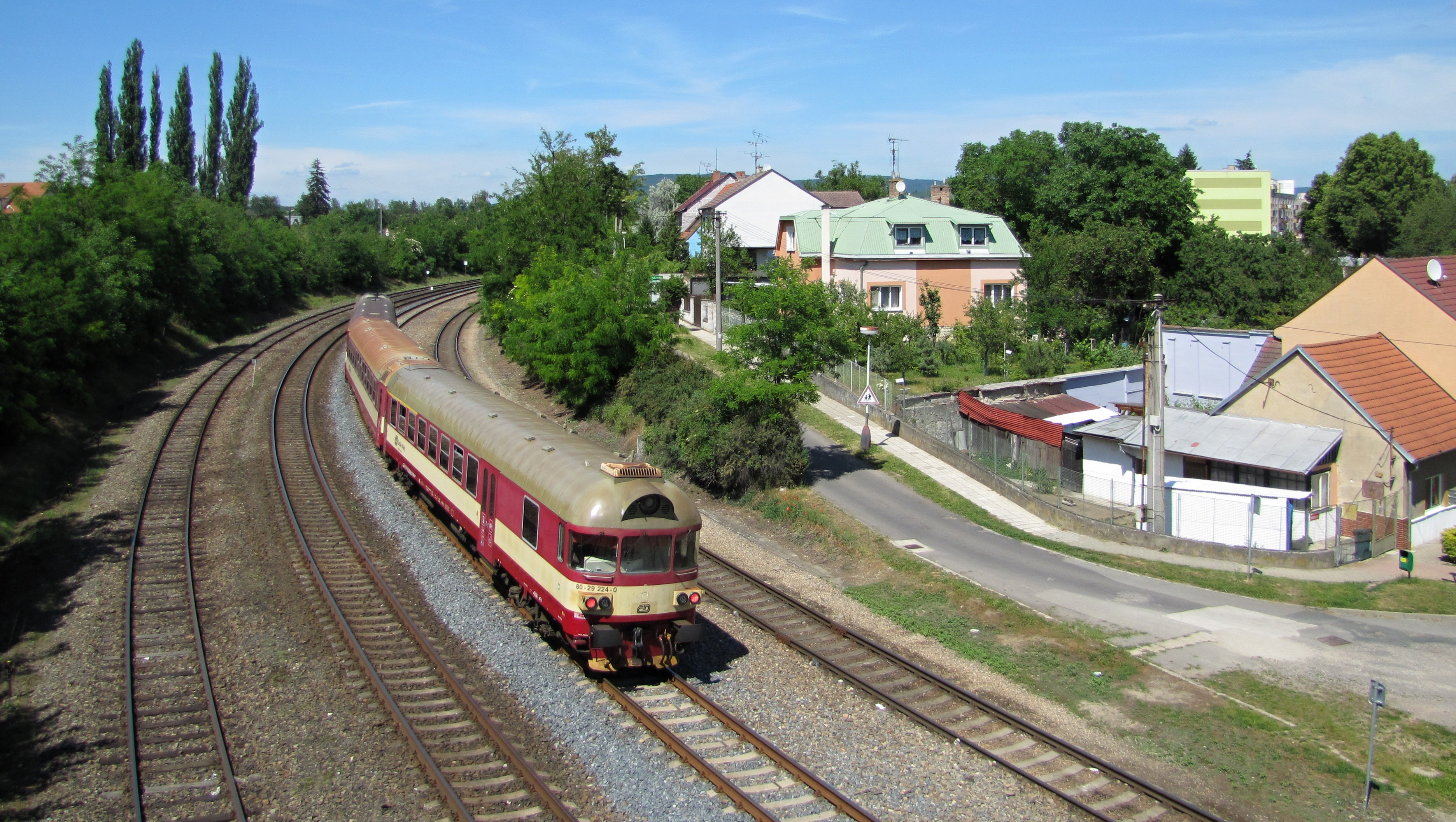 Pohled z mostu (nadjezdu) v Kyjově na trať č. 340 (Vlárská dráha)